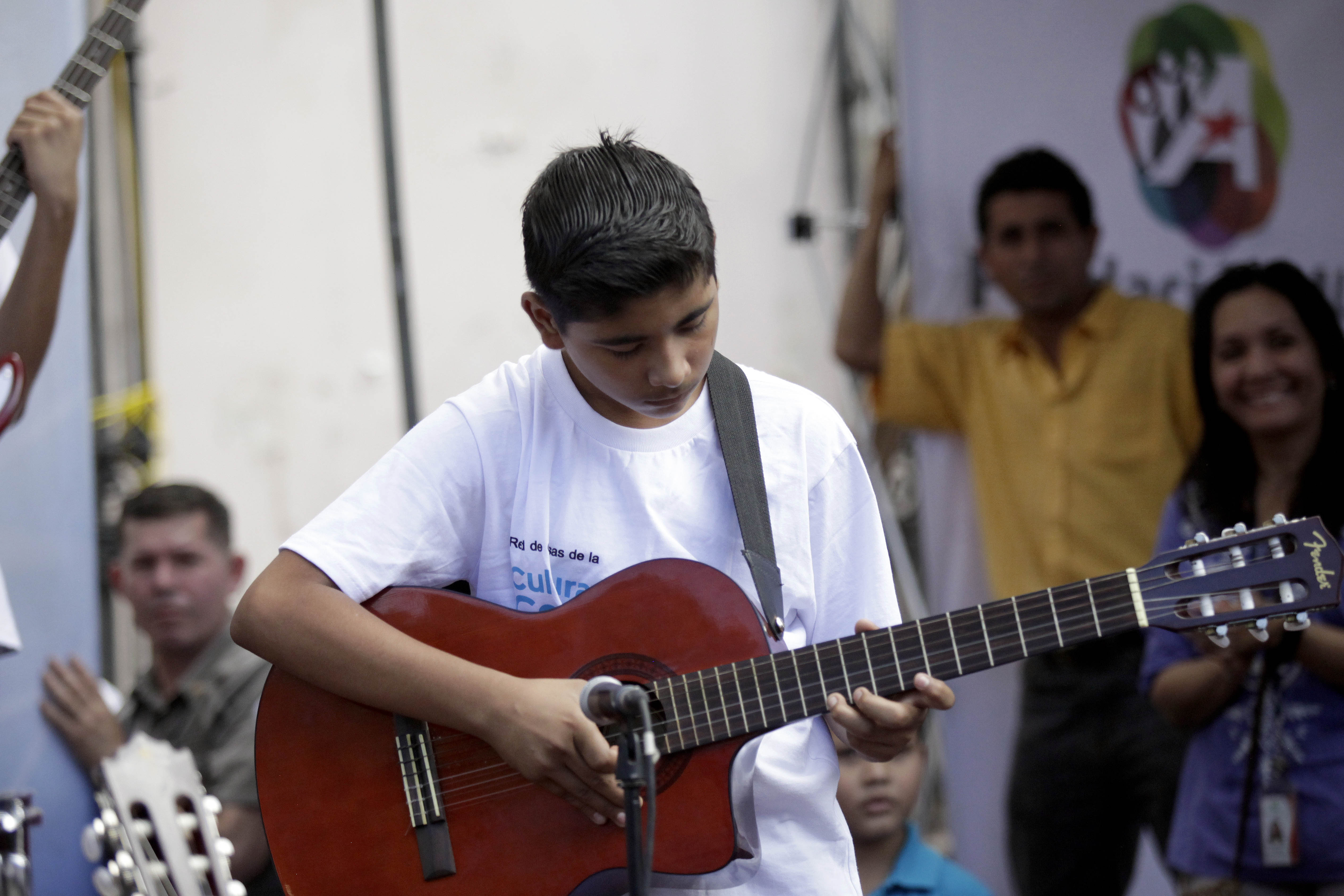 Gobernando con la Gente Sonsonate 15